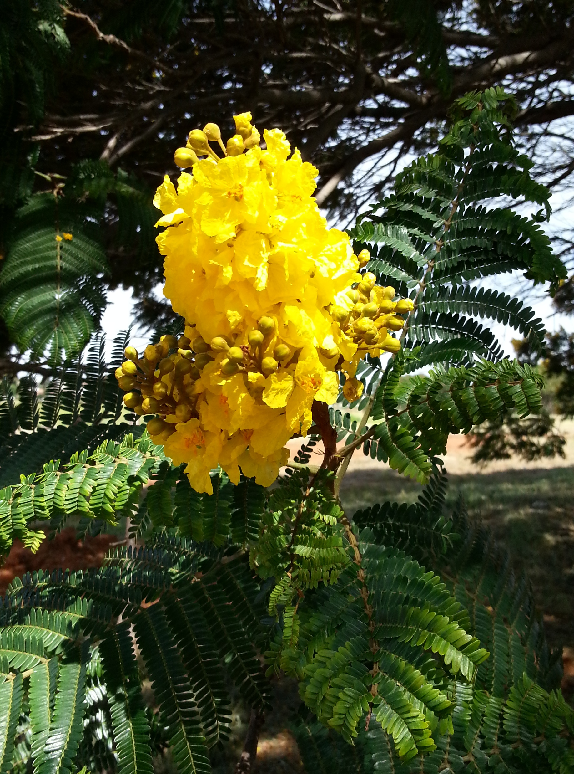 Canafístula, também conhecida como cambuí, é uma árvore muito cultivada em Brasília-DF, com suas típicas inflorescências amarelas, no mês de janeiro. Nome Científico: Peltophorum dubium